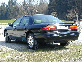 Chrysler Vision 1996